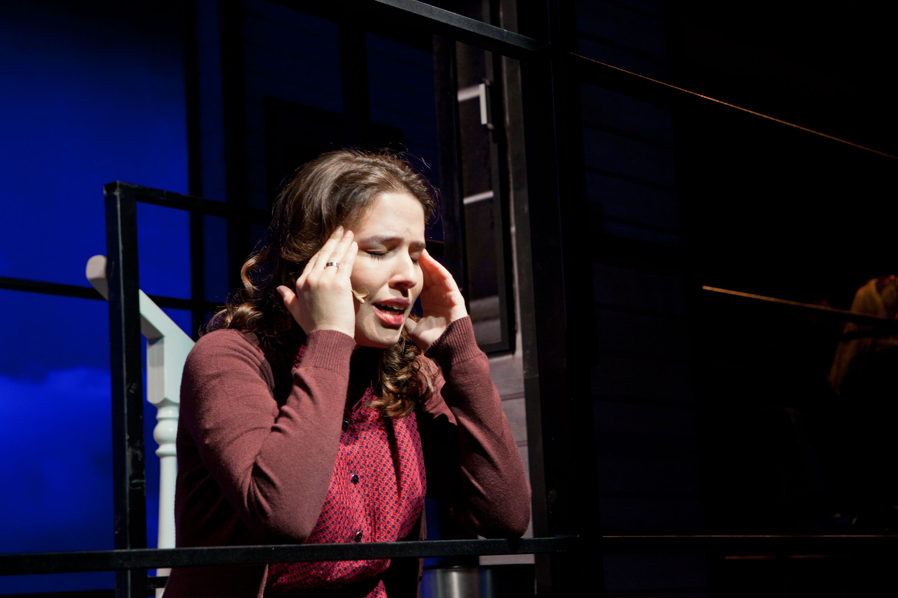 איילת רובינסון באופרת הרוק כמעט נורמלי